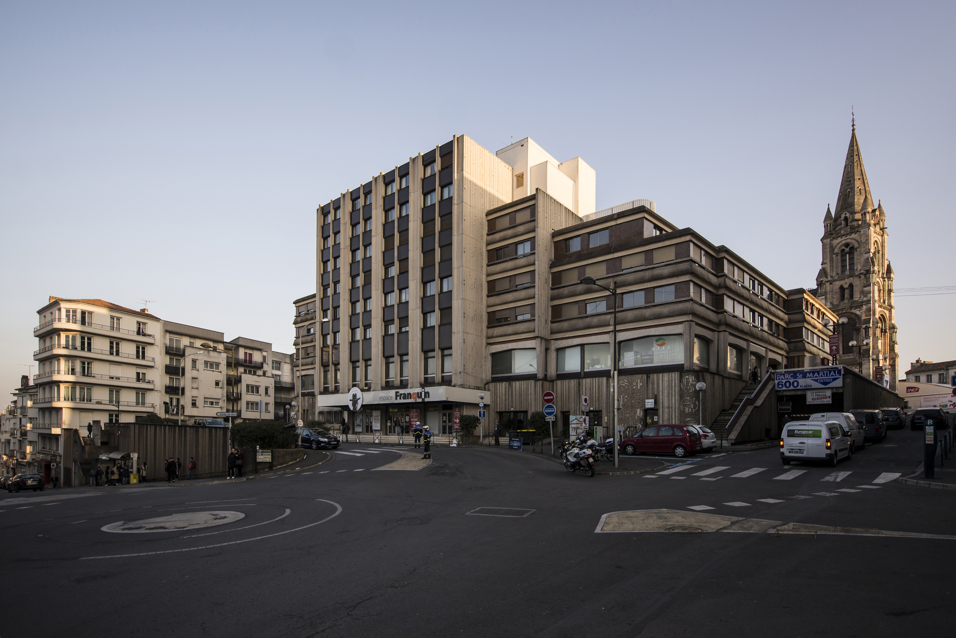 Espace Franquin et église Saint-Martial, Festival International de la Bande Dessinée d'Angoulême 2017.